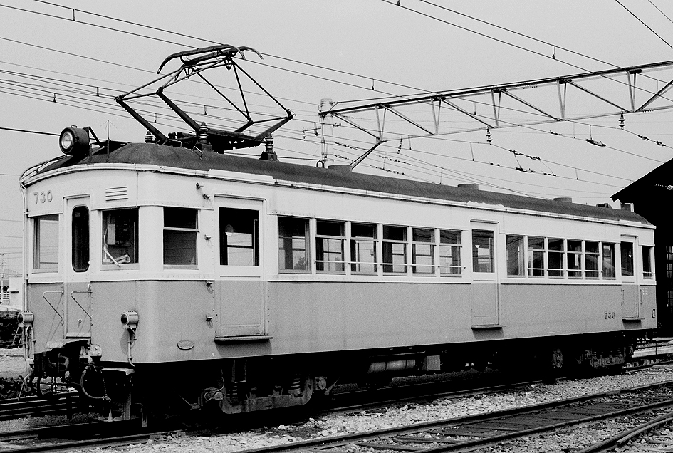 高松琴平電鉄 7000形730